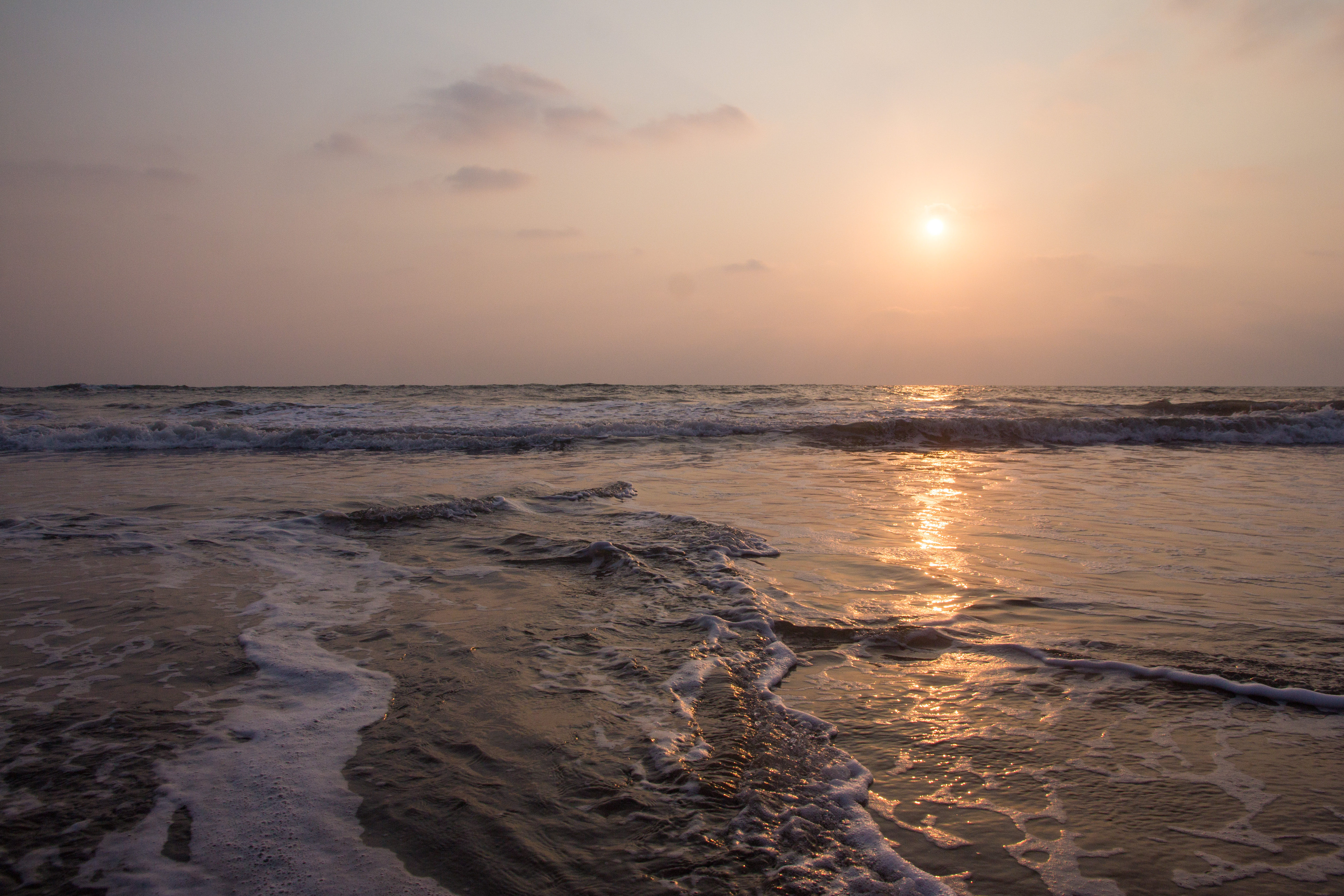 Kalacha Beach